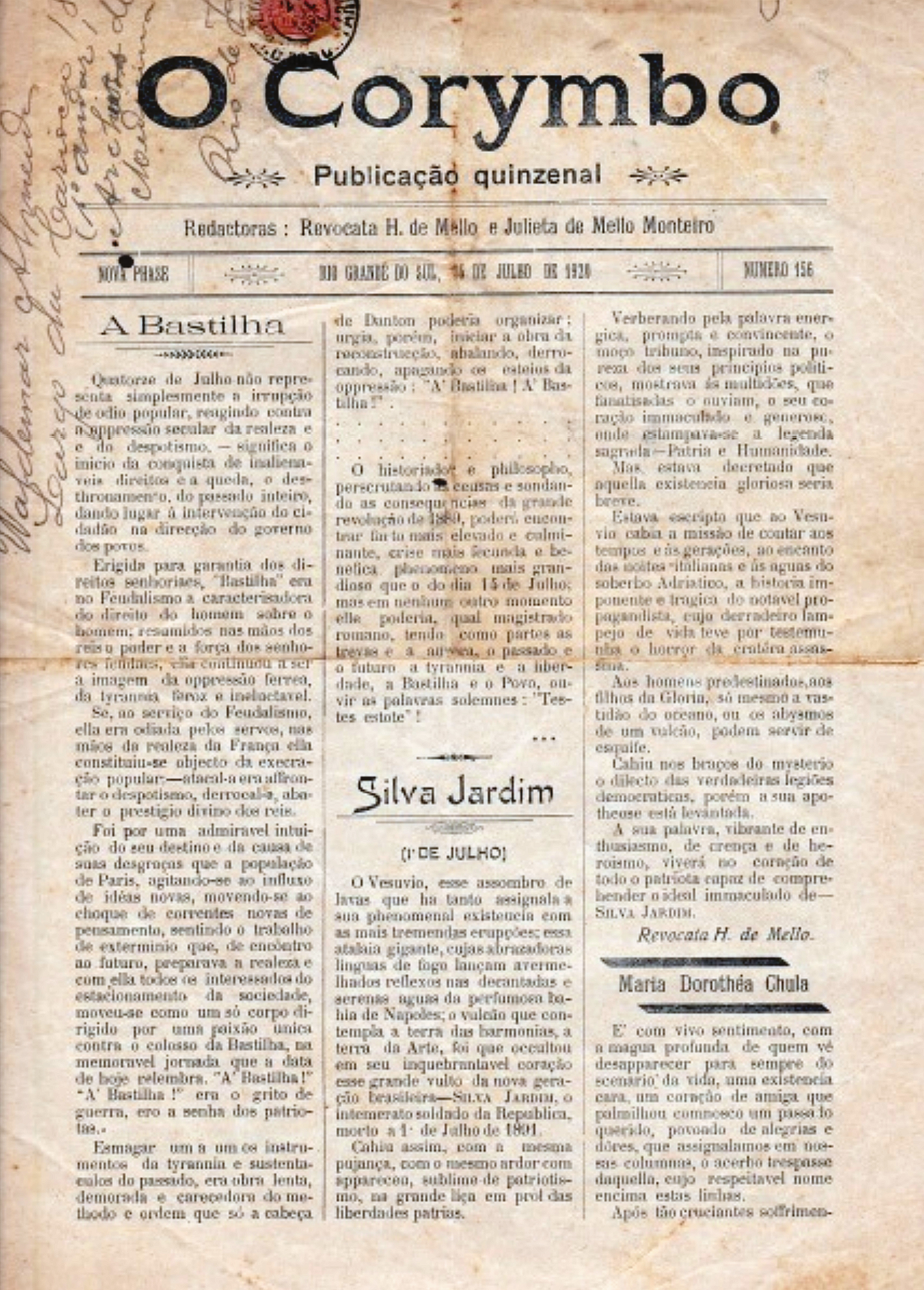 O Corymbo